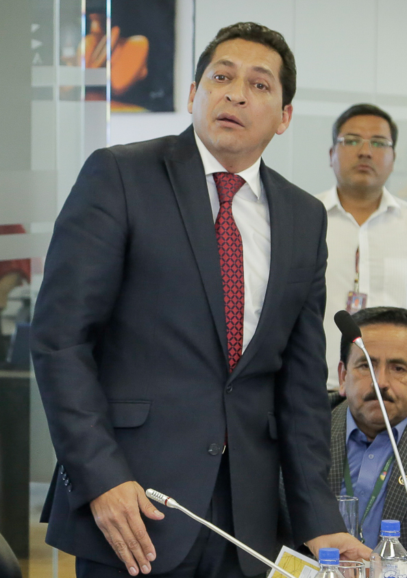 Marco Troya en 2017